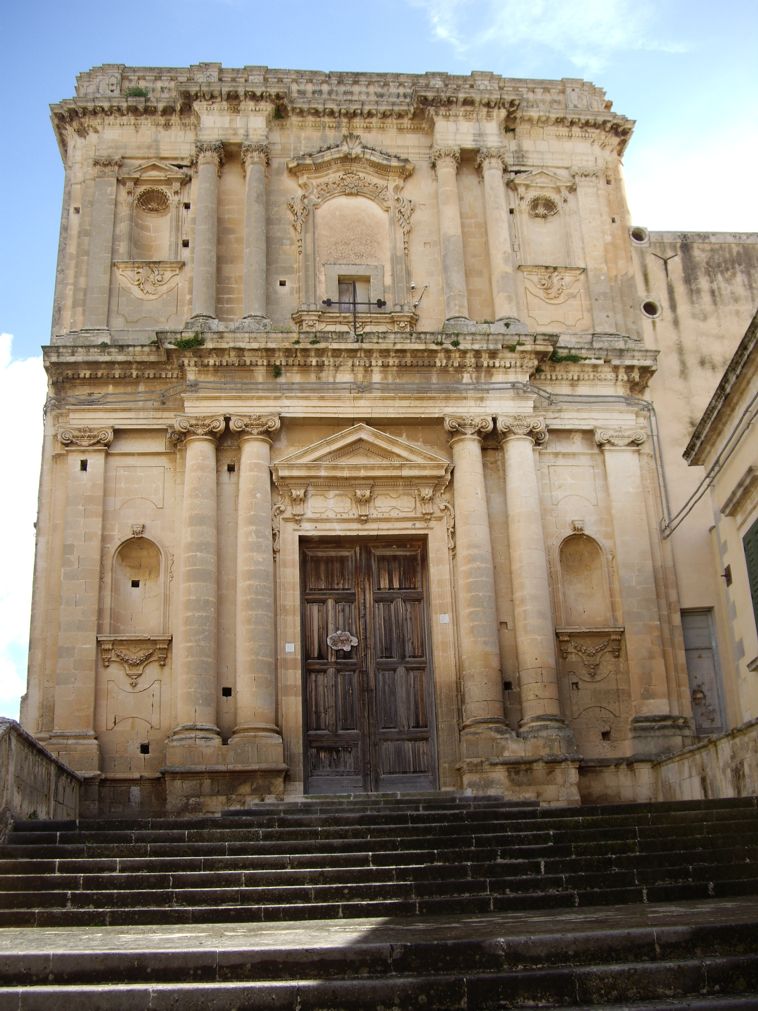 Agate deunaren eliza